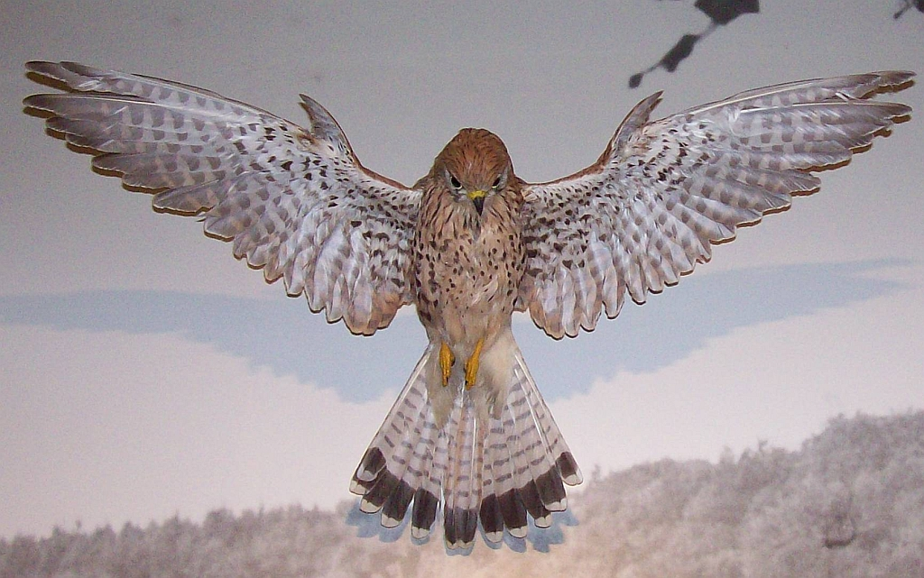 Falco_tinnunculus_(Turmfalke)